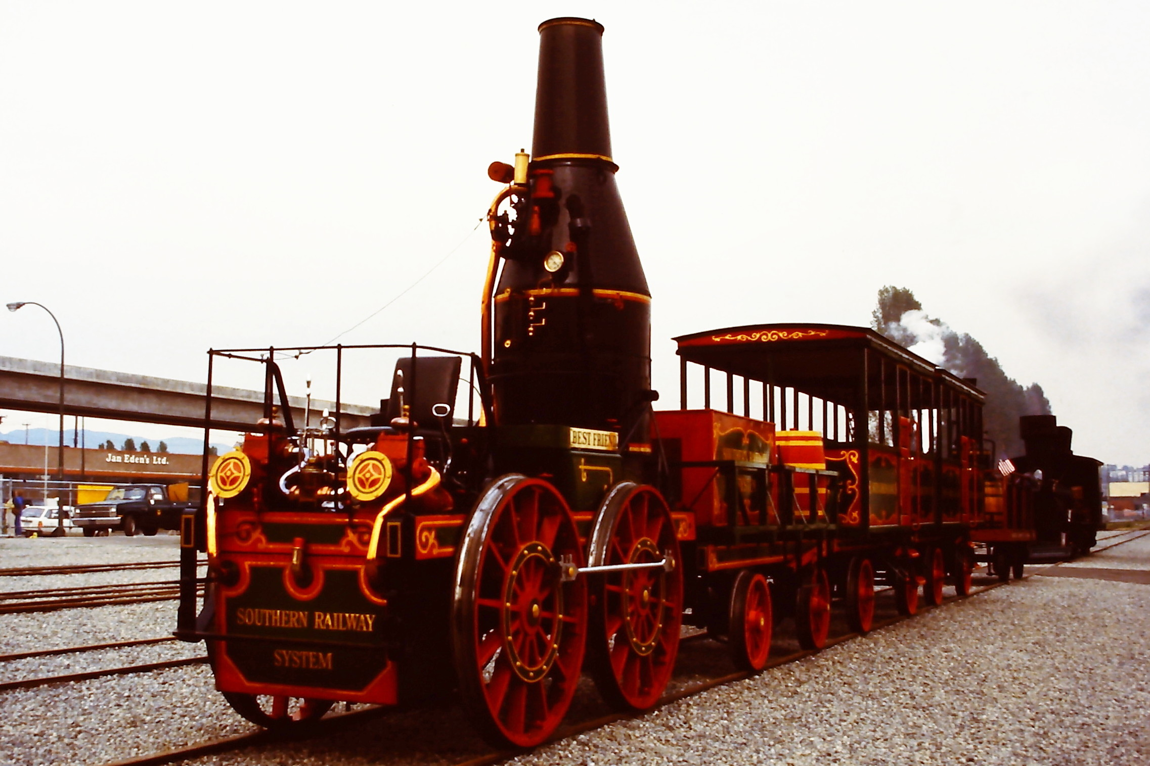 Dampflokomotive Best Friend of Charleston auf der SteamExpo 86